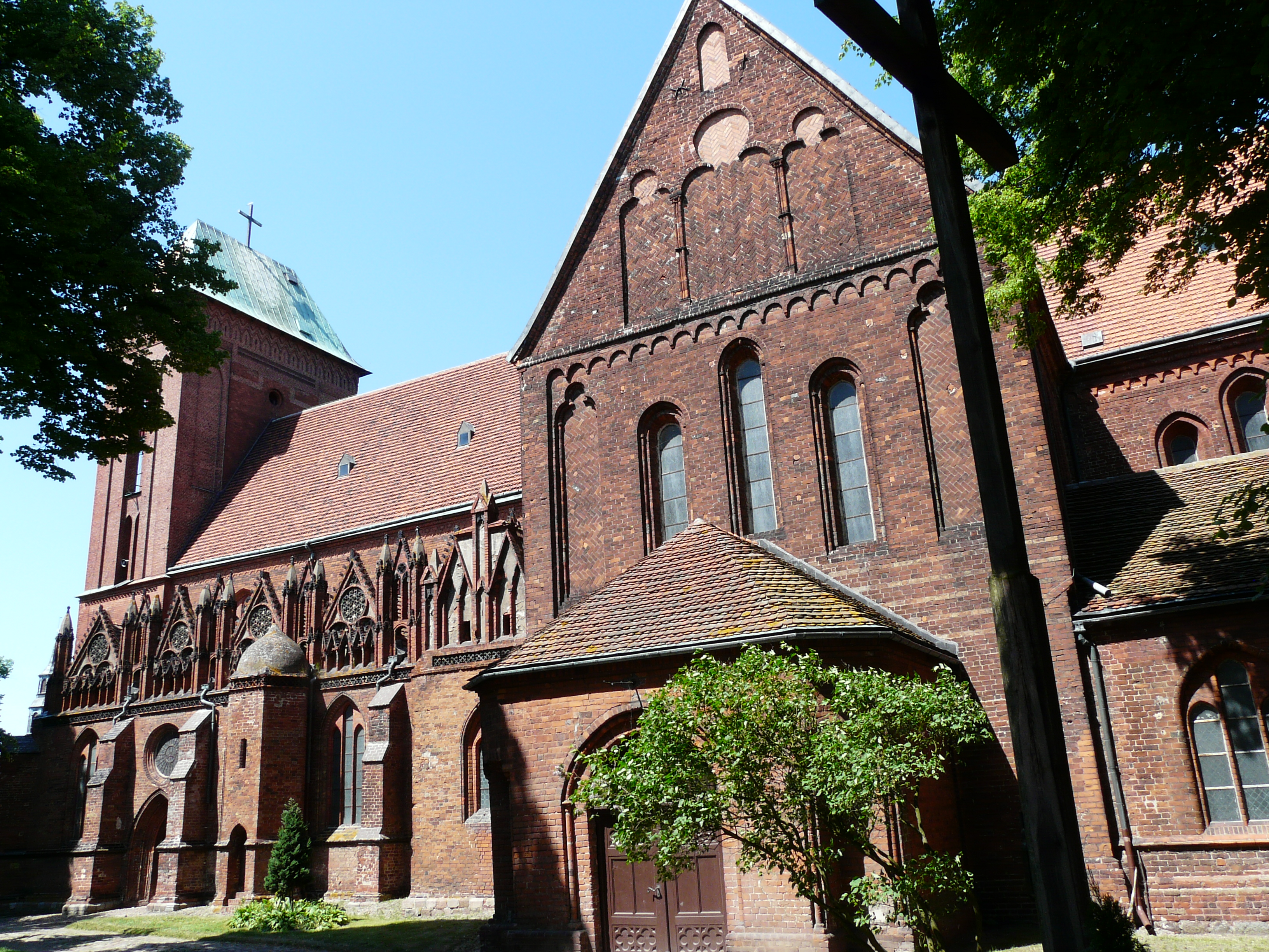 Exteriér katedrály v Kamienu Pomorskiem, Západopomořanské vojvodství, Polsko